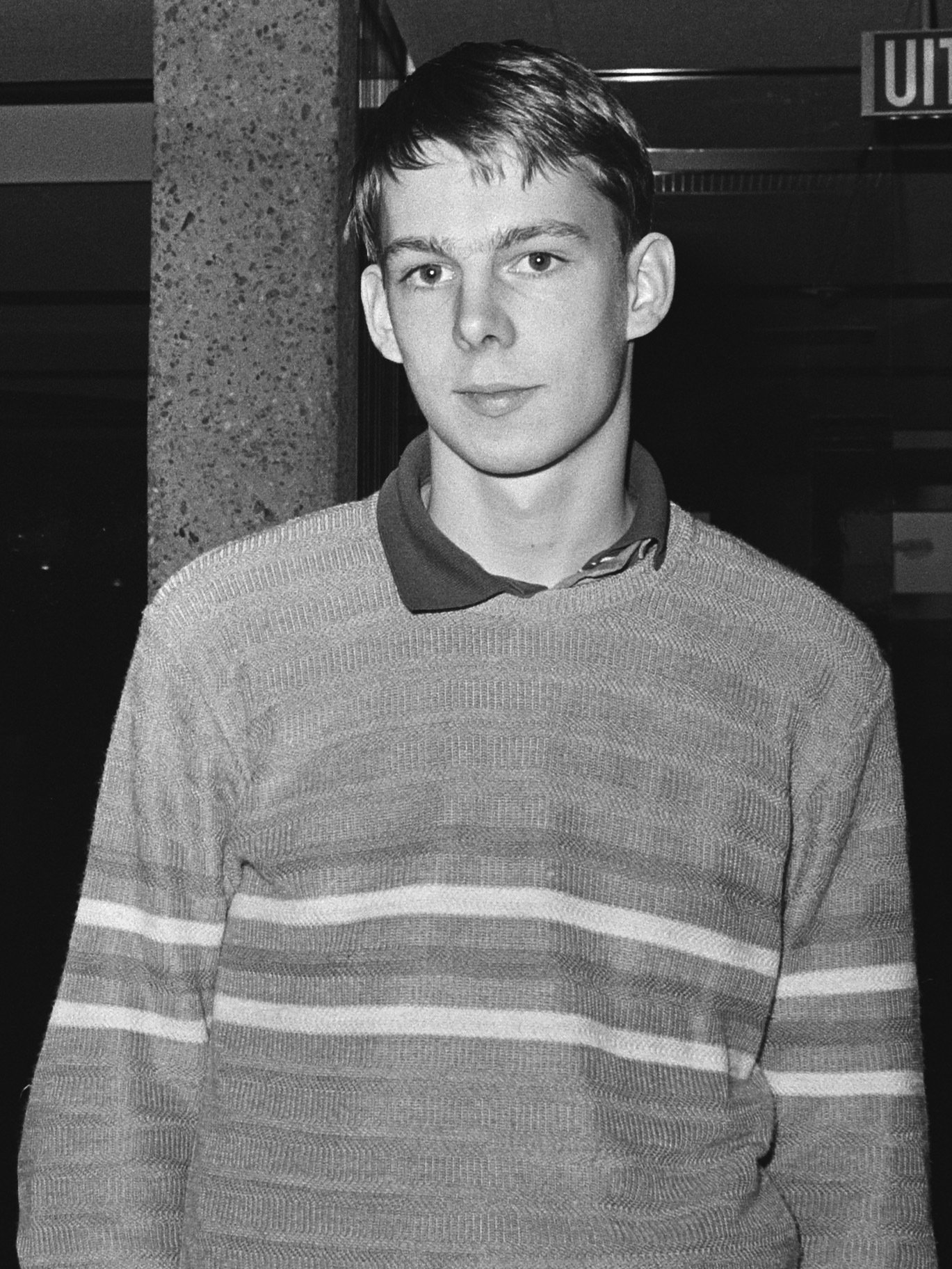 Johan Krajenbrink (links) en Wieger Wesselink.